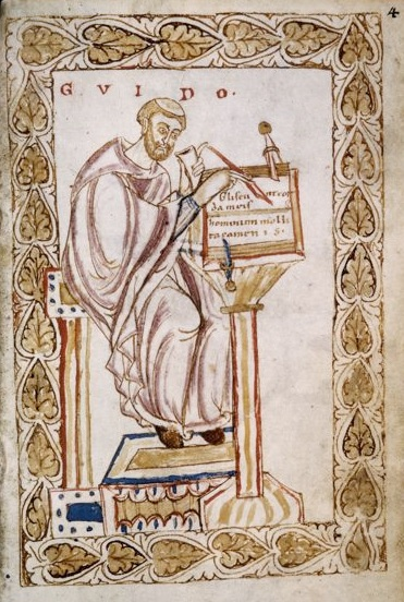 Guido van Arezzo. Bron onbekend, maar kennelijk Middeleeuws.